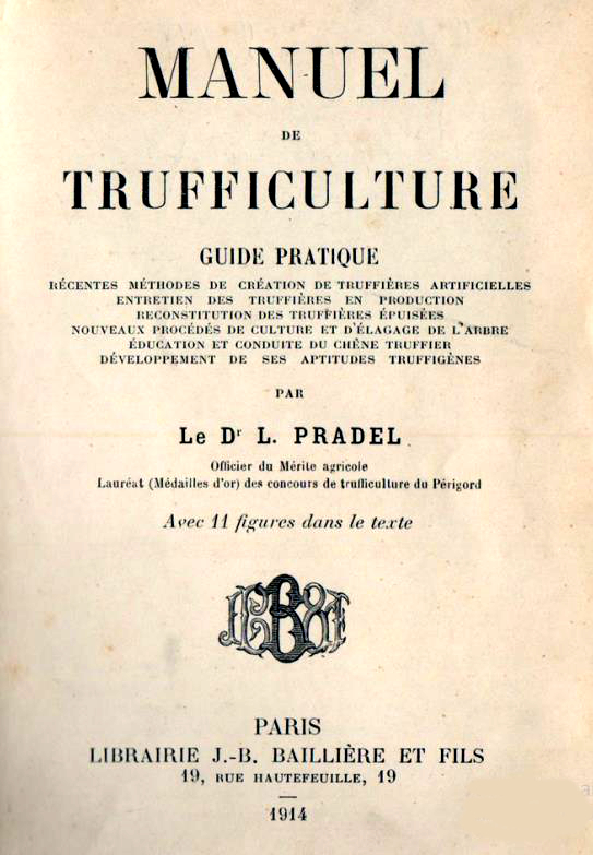 MANUEL DE TRUFFICULTURE : Dr G.Pradel- Eddition J.B.B Baillère et Fils - 1914 - Tri- aïeul de Pierre-Louis CHAMINADE, époux de Christine, TUFFICULTRICE.